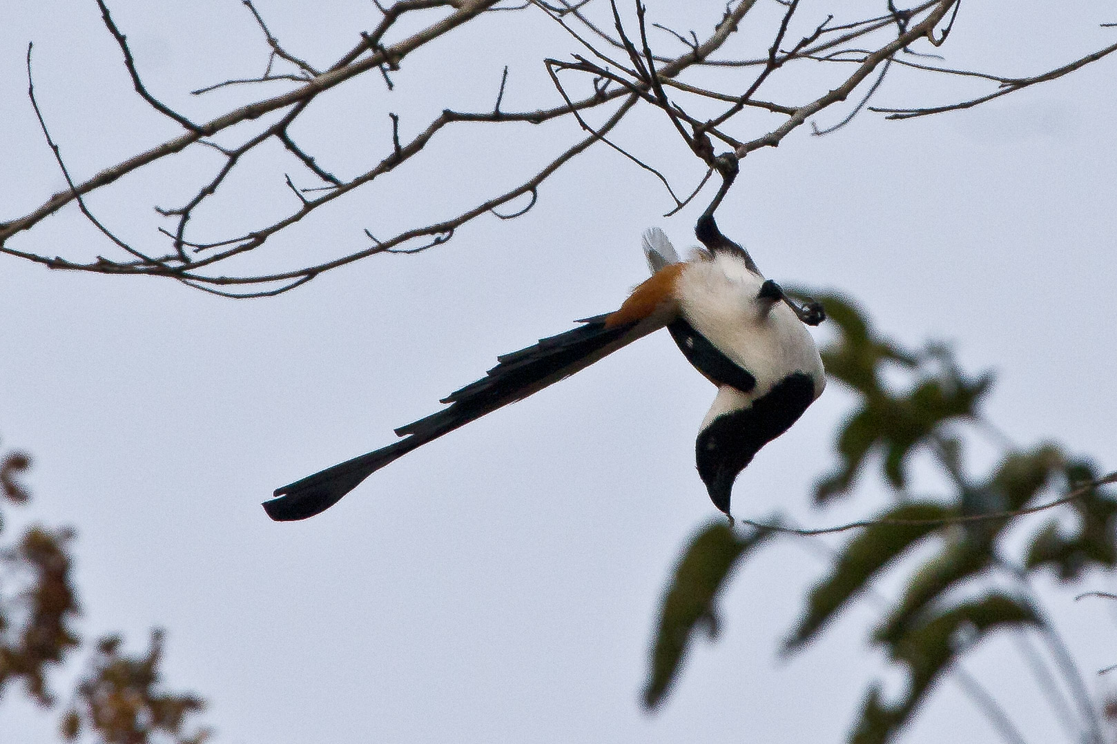 White-bellied Treepie